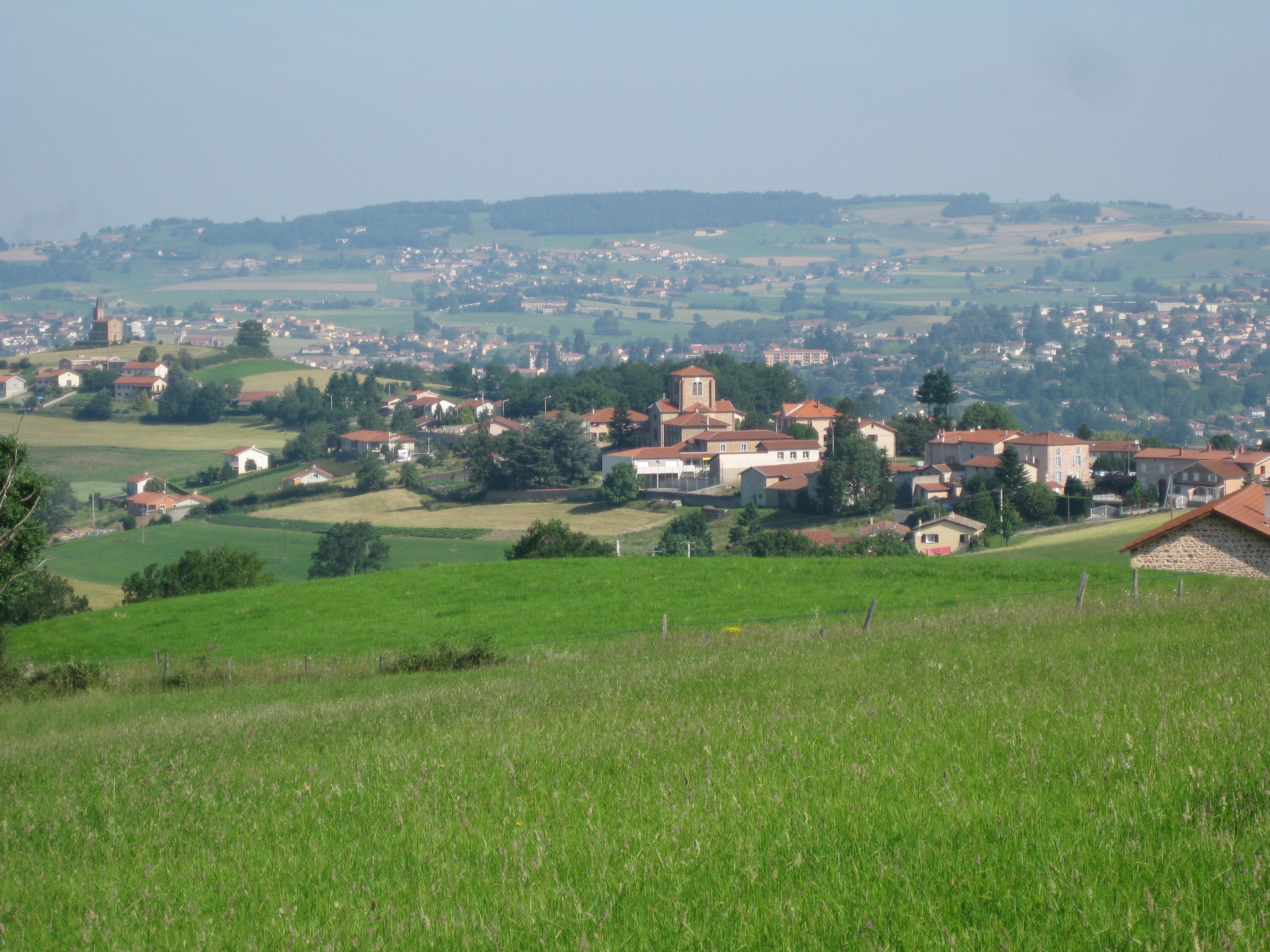 village de COISE 69590 Rhône